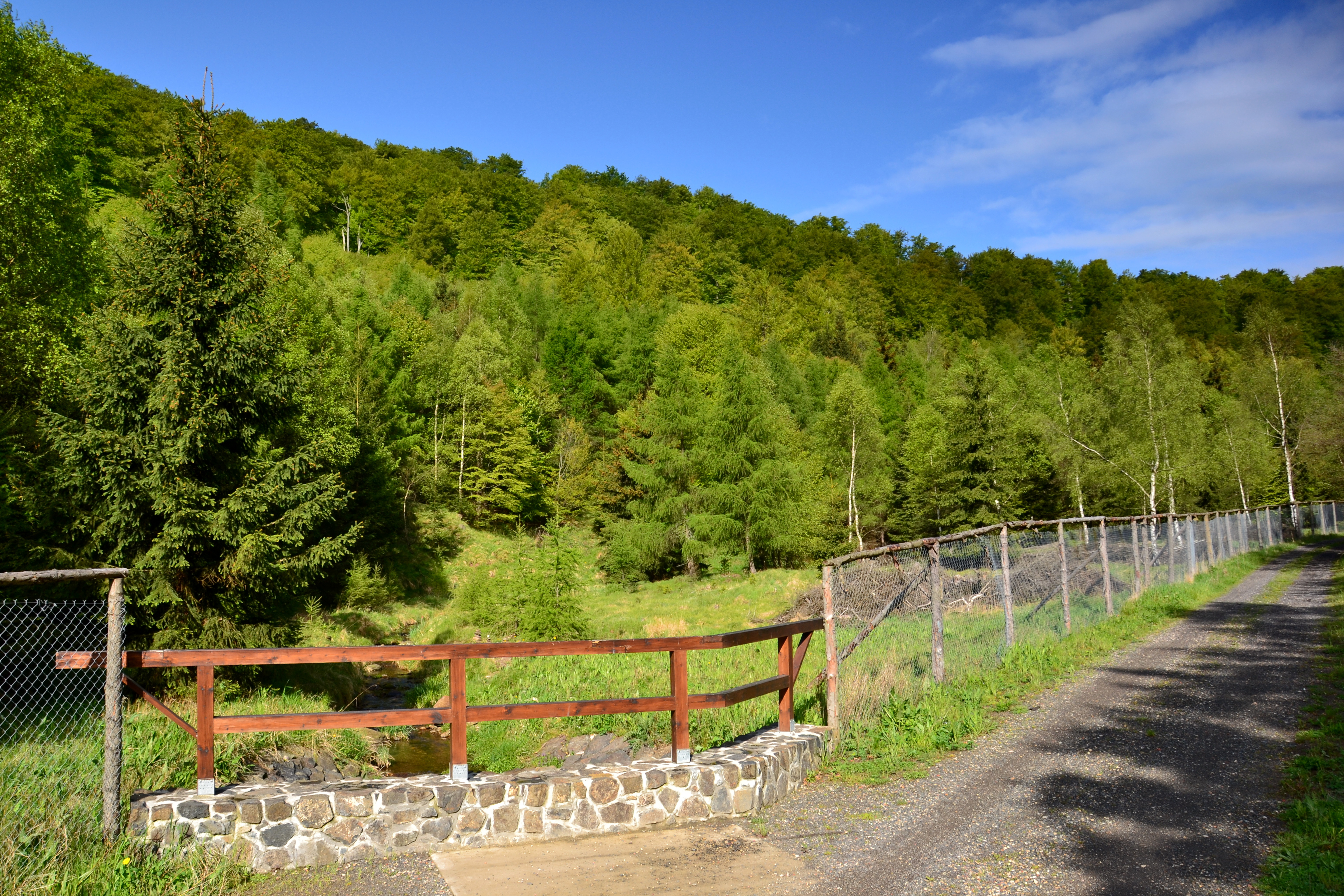 Oplocená část rezervace ve spodní části údolí